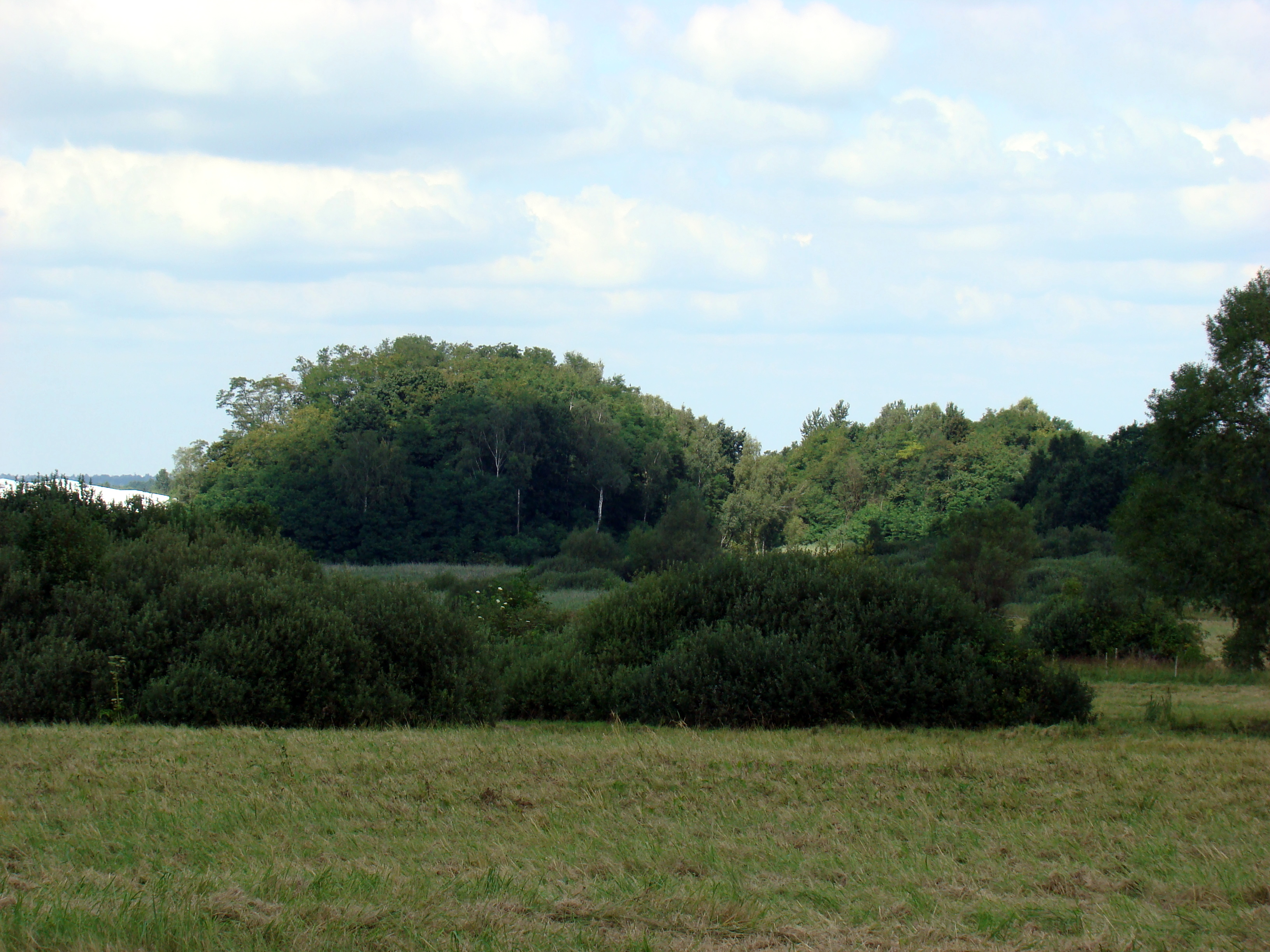 Hałda kopalni rud żelaza "Włodzimierz" w Hucie Starej A w okolicach Psiej Górki